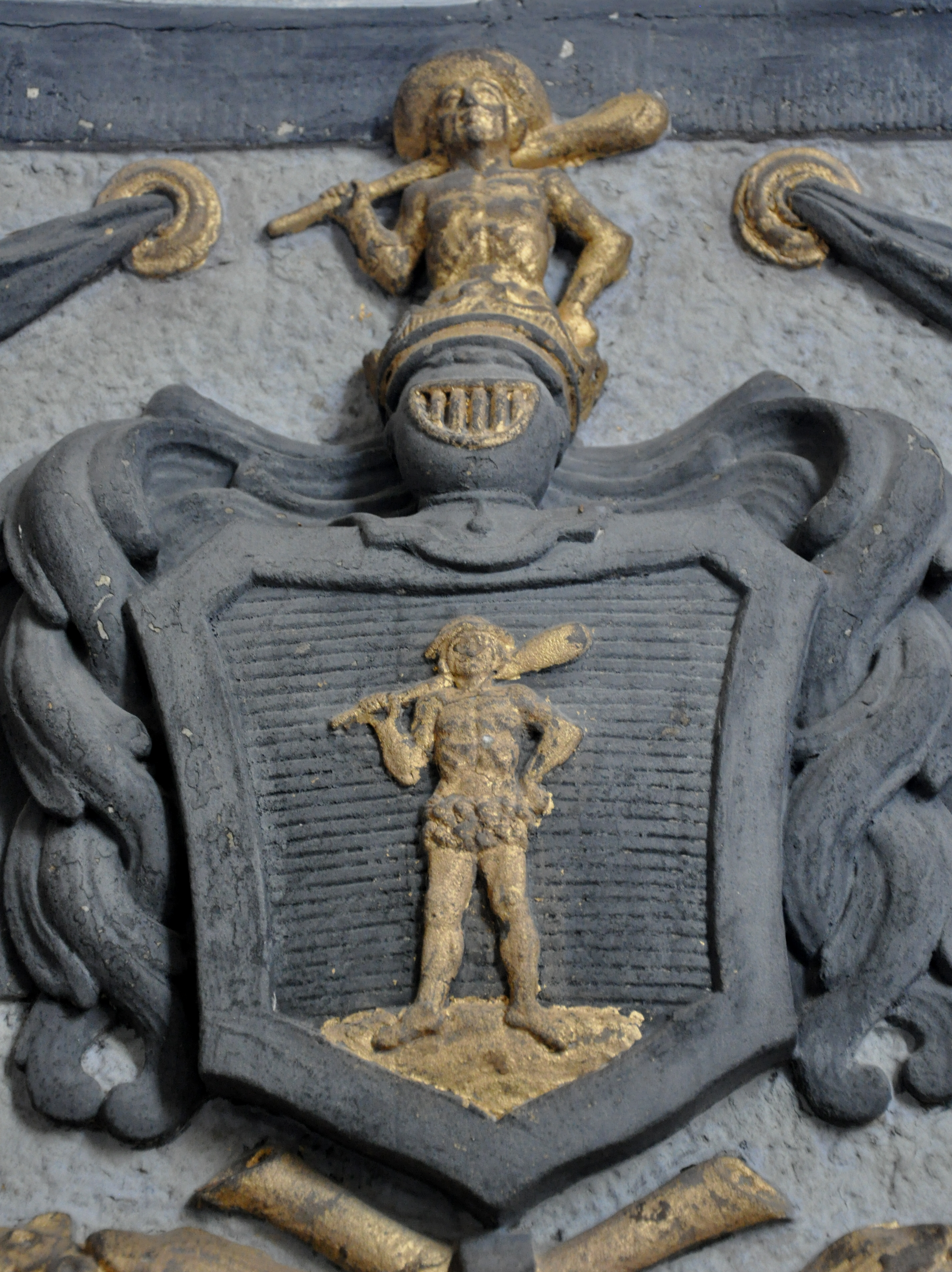 Klosterkirche Wald (Landkreis Sigmaringen), Epitaph der Äbtissin Maria Edmunda von Kolb; Wappen